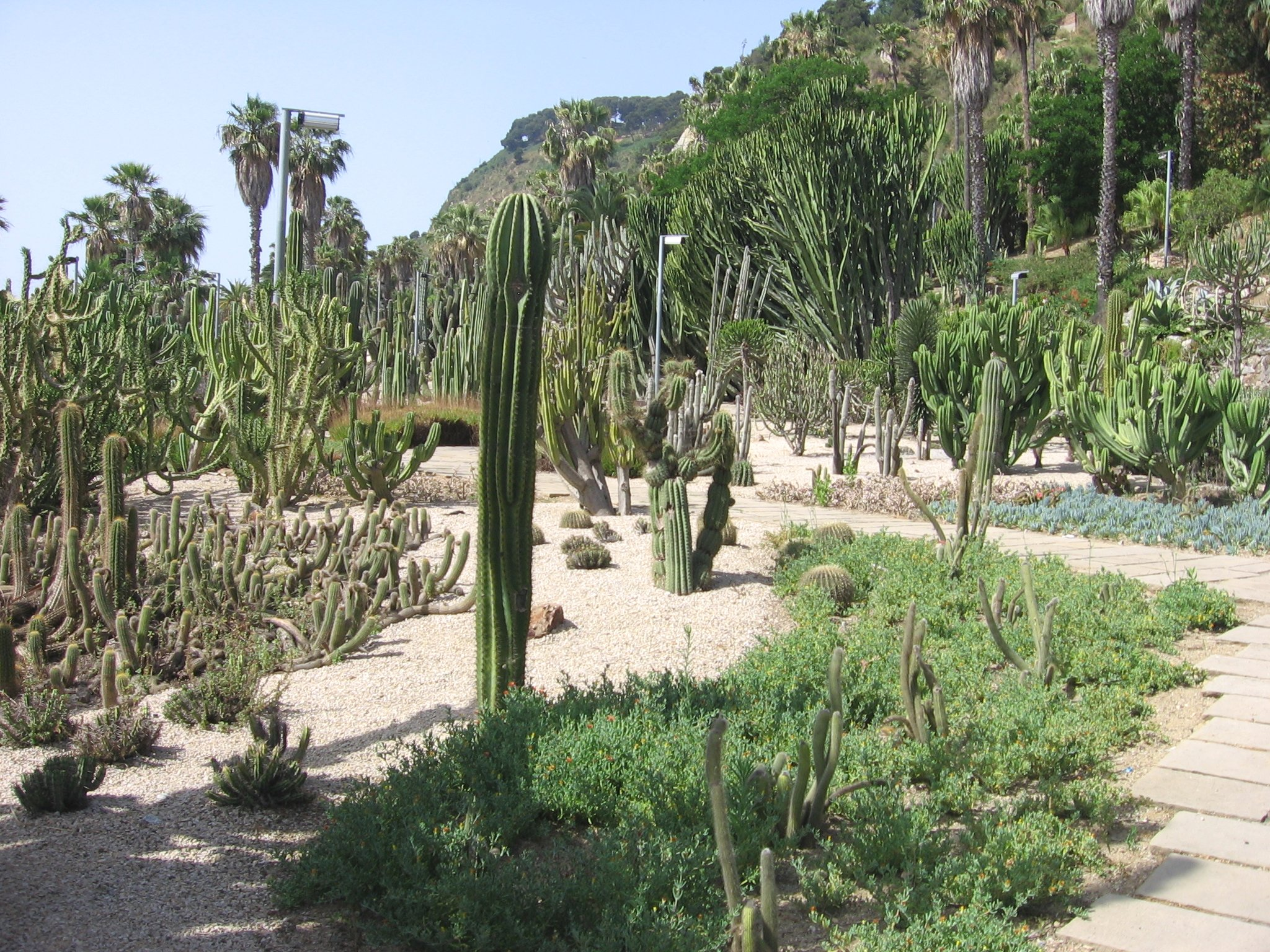 Jardines Mossèn Costa i Llobera, Parque de Montjuïc, Barcelona.